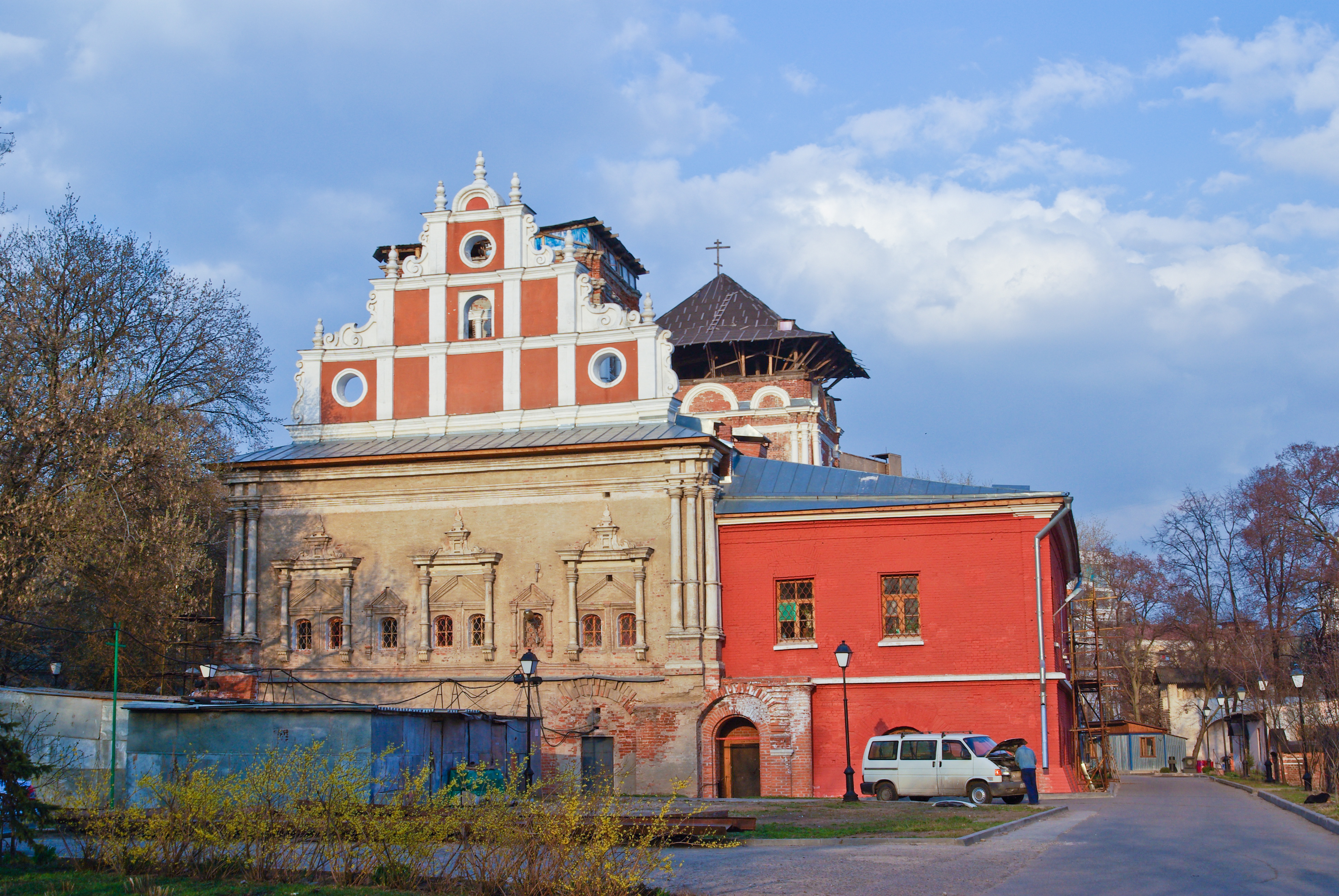 Симонов Монастырь. Москва. Simonov Monastery. Moscow.